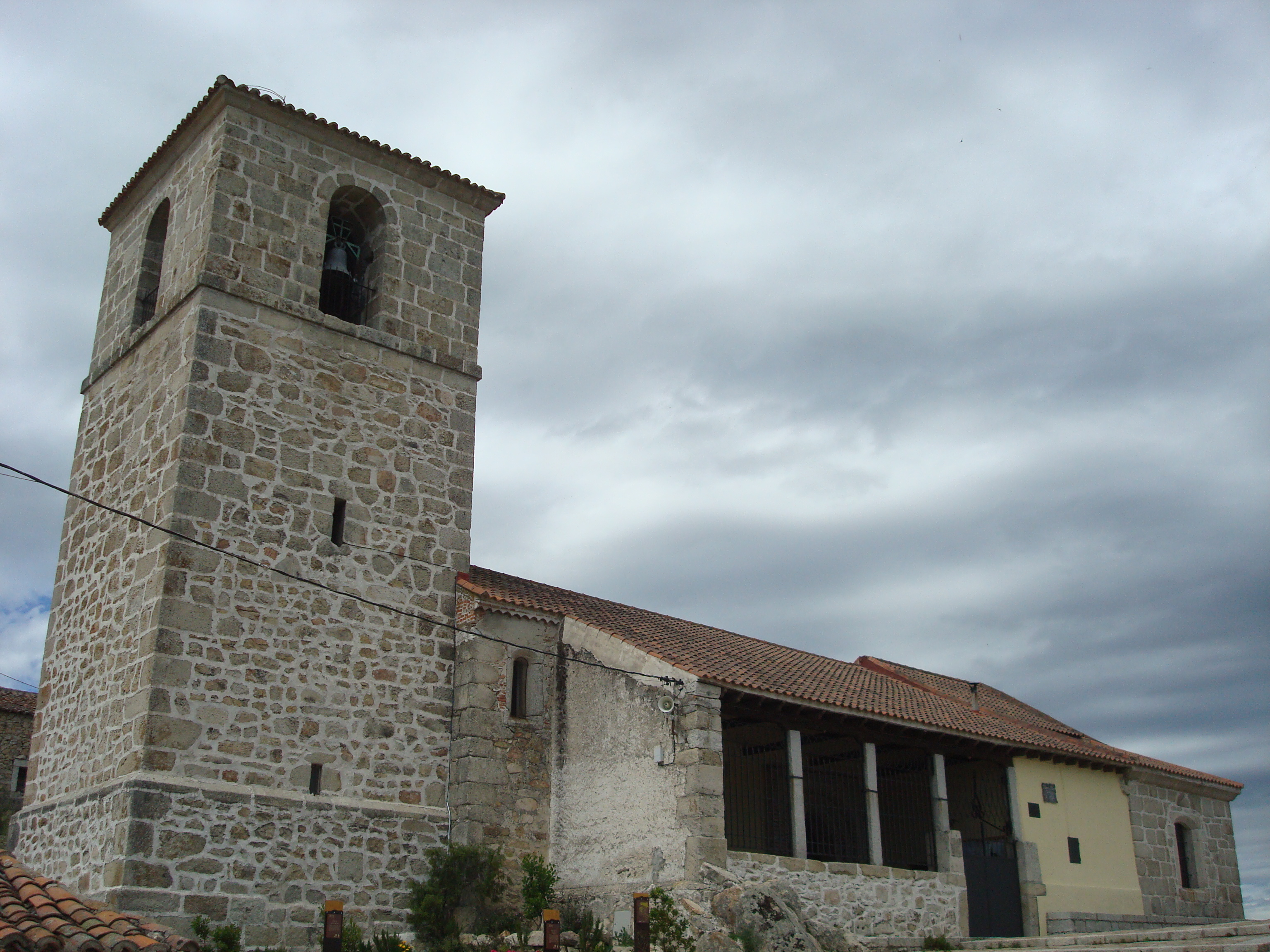 El Berrueco - 002